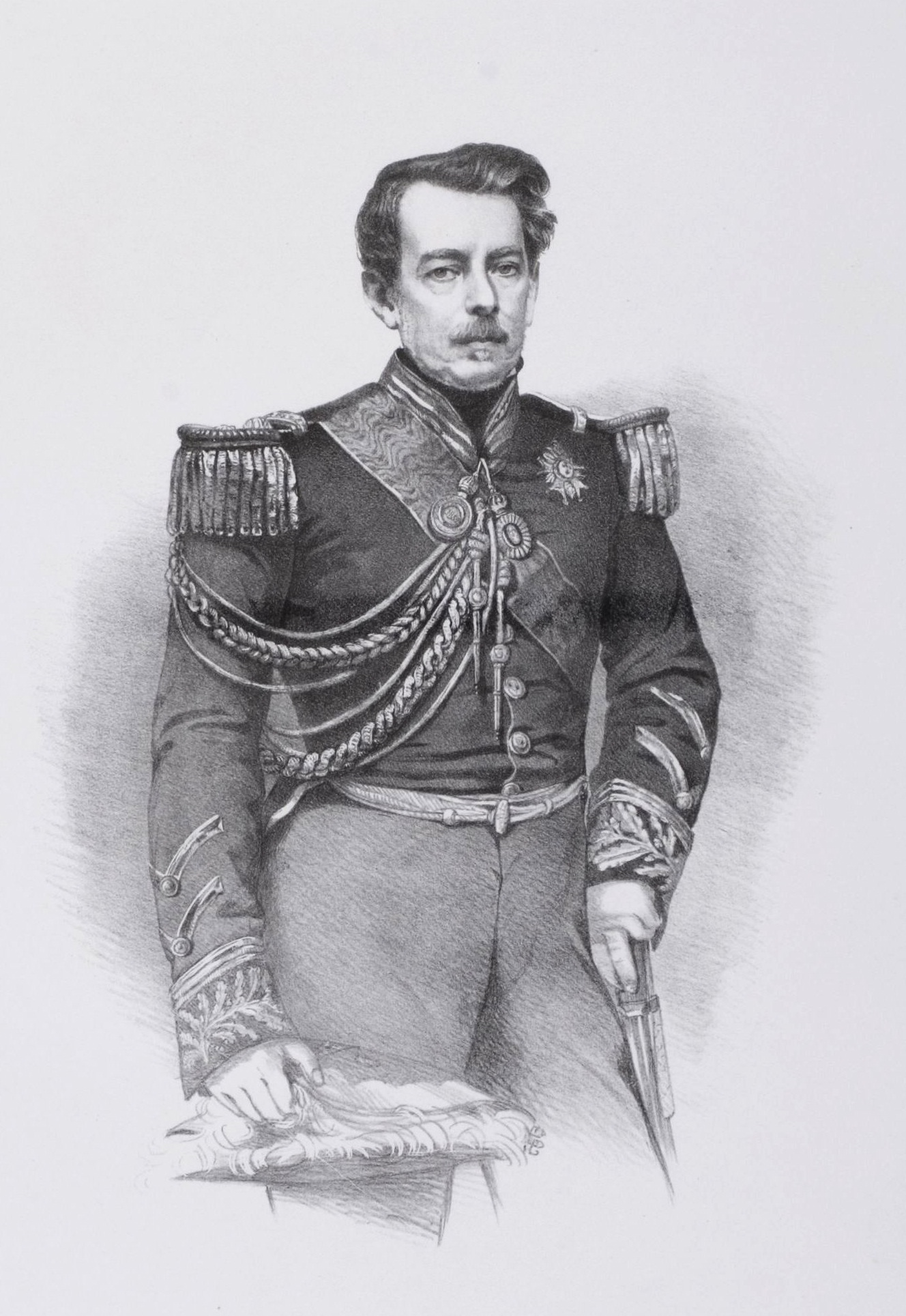 Luís Alves de Lima e Silva, then-Marquis (later Duke) of Caxias